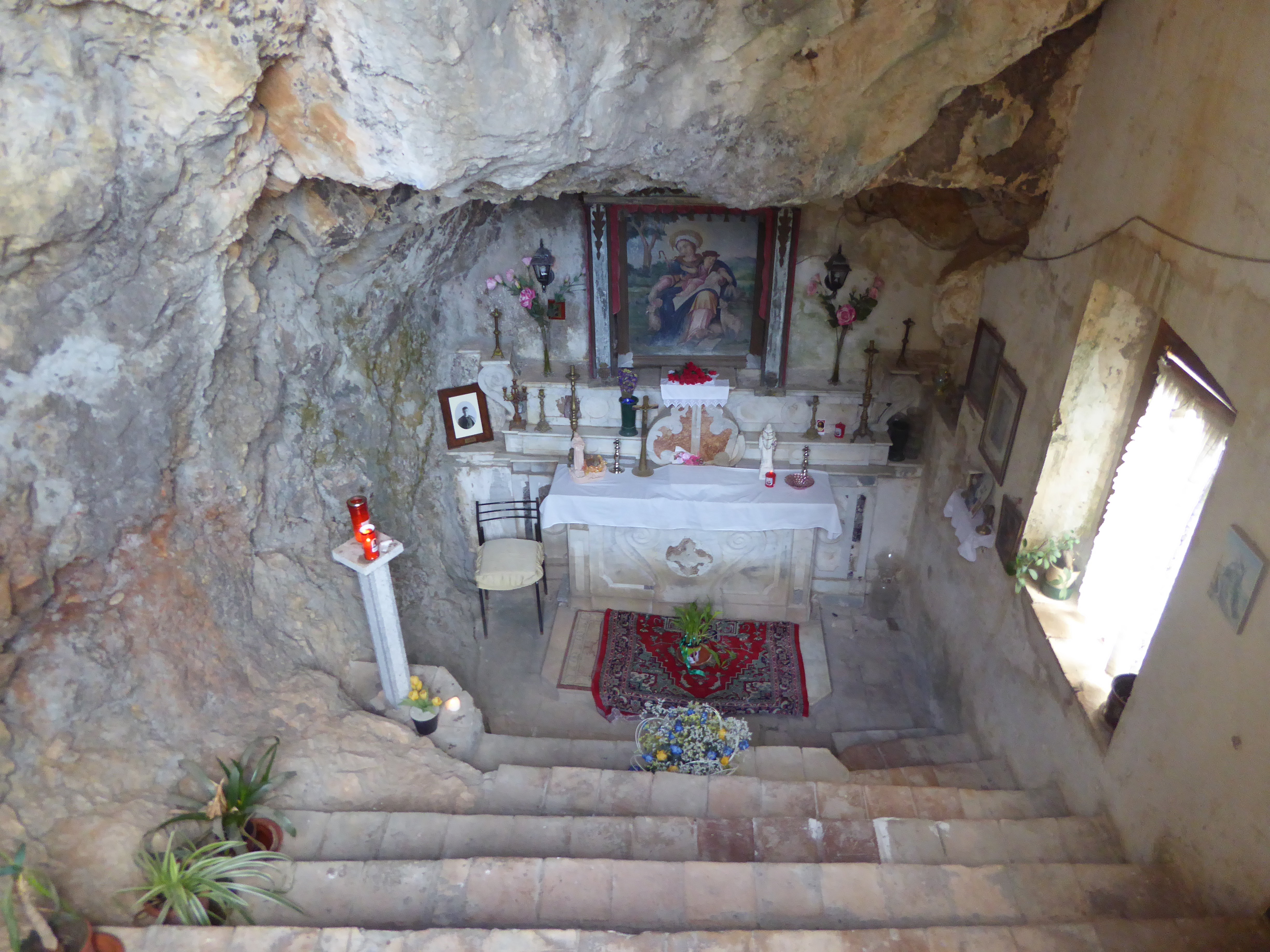 Chiesa della Divina Pastorella a Stilo (2018) ex Laura Monastica sul Monte Consolino